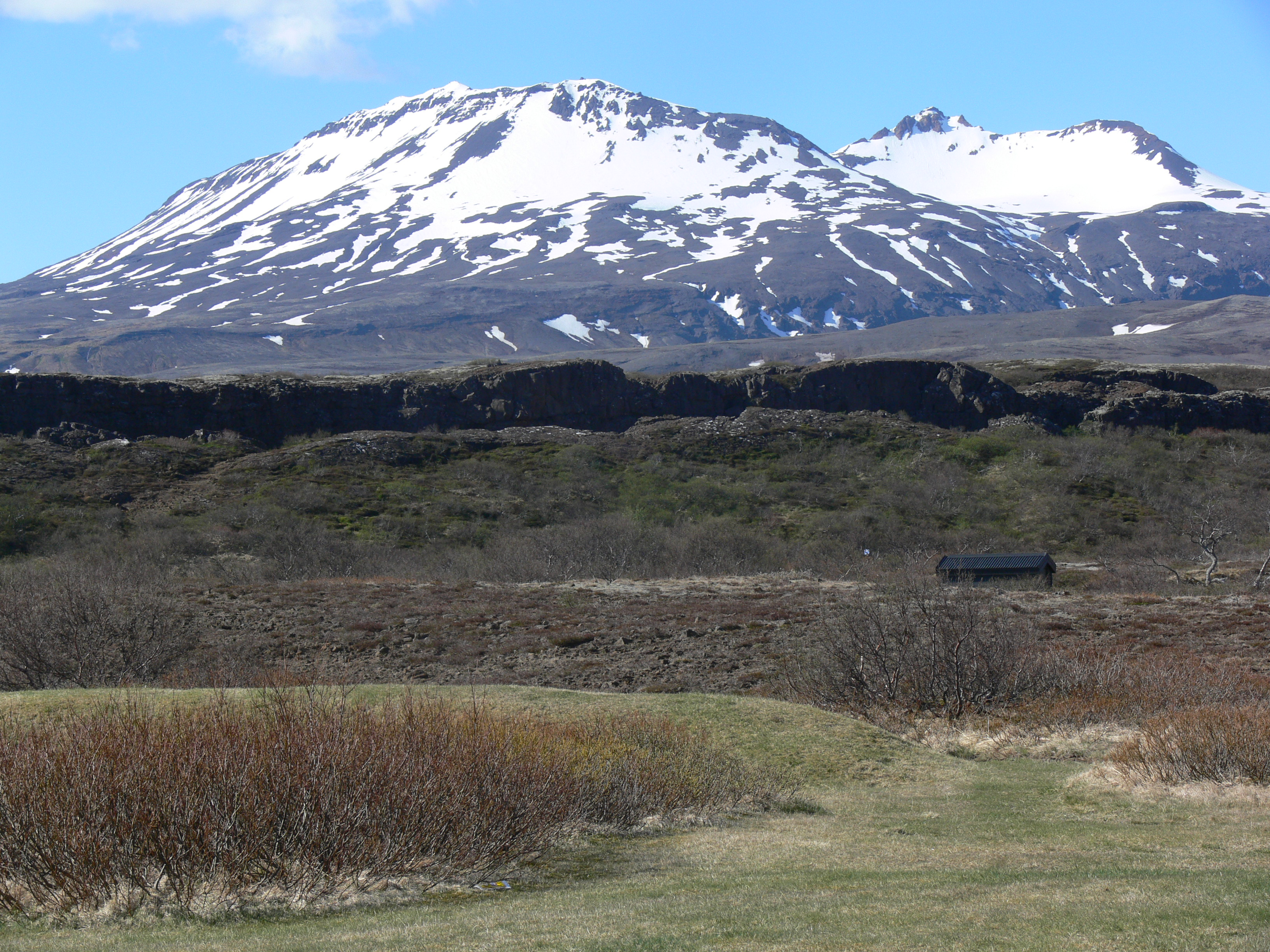 Sicht über die Allmannagjá auf Búrfell